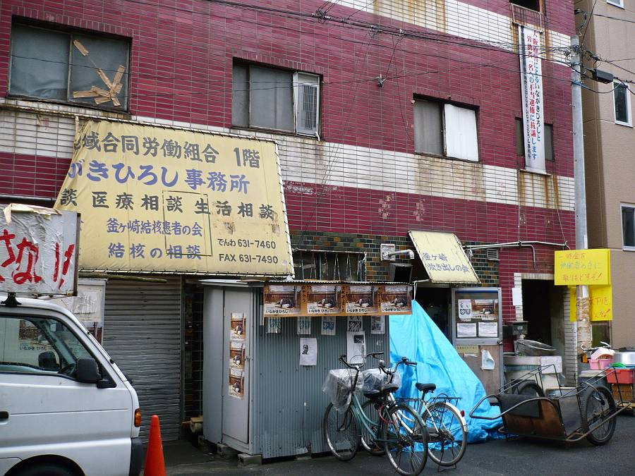 Kamagasaki Liberation Hall